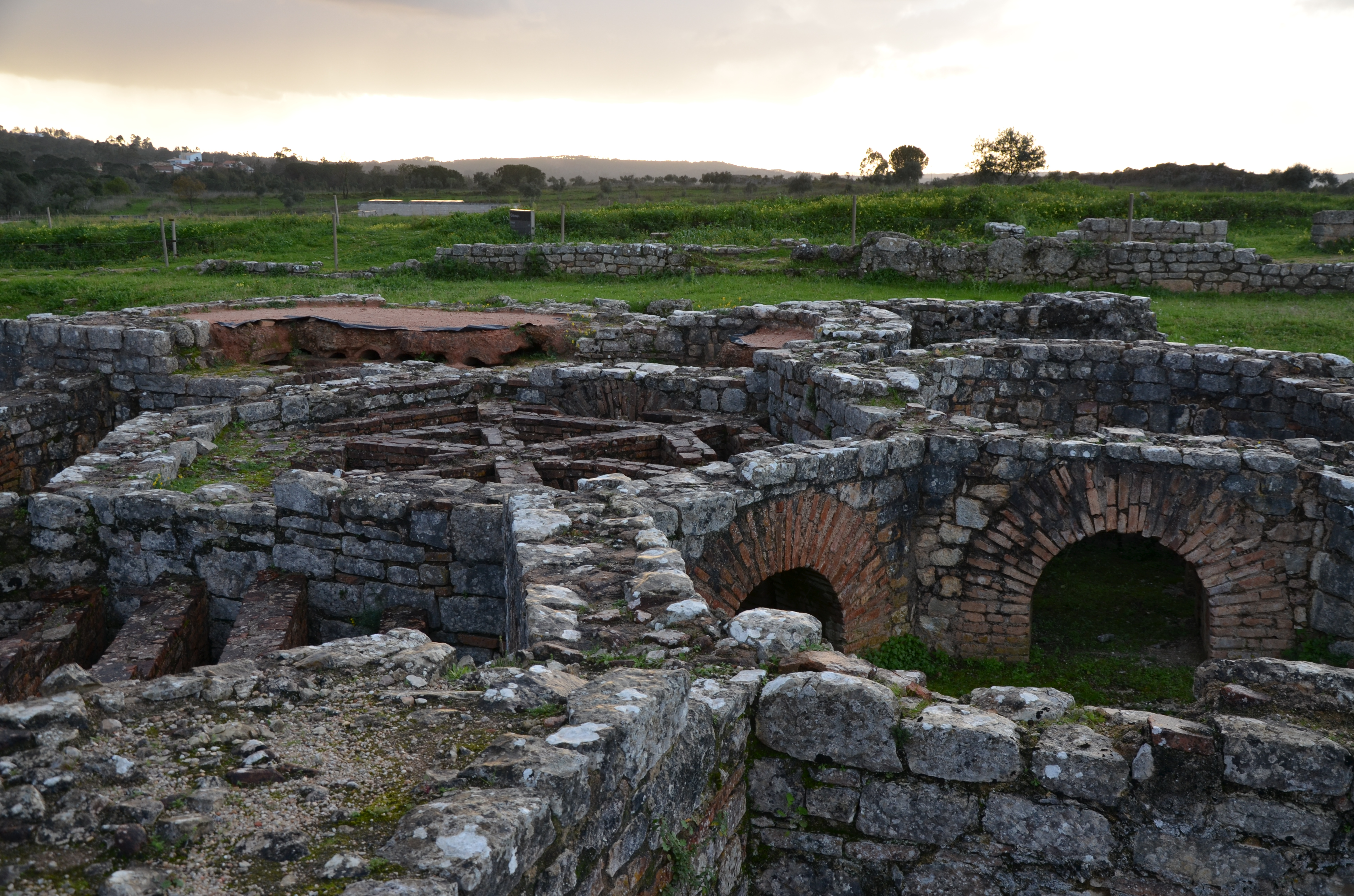 Conimbriga